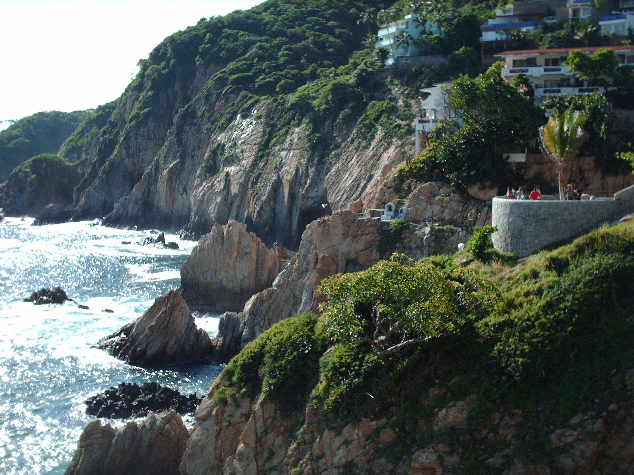 No hay clavadista... =P